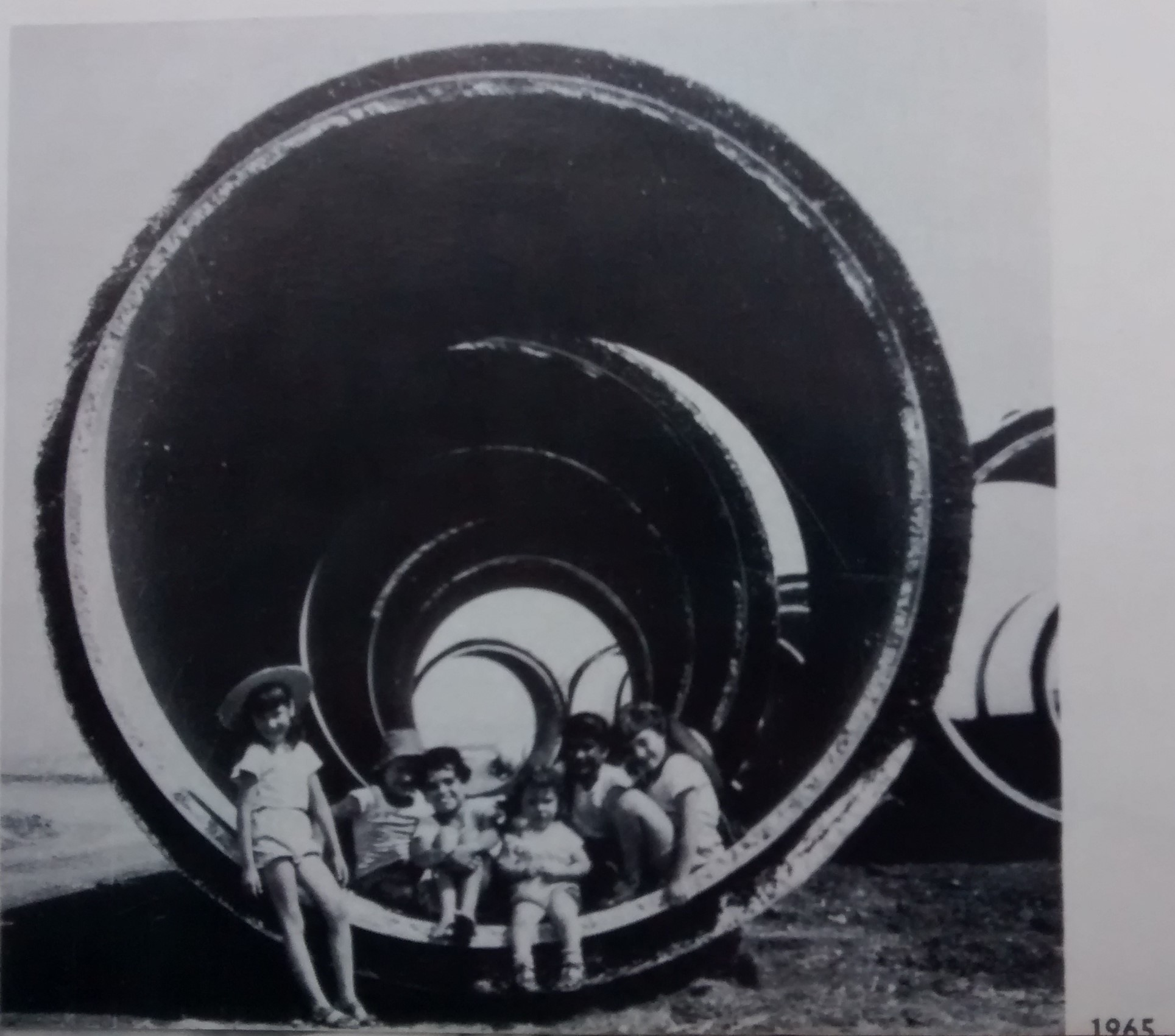 מוזיאון החצר הישנה עין שמר